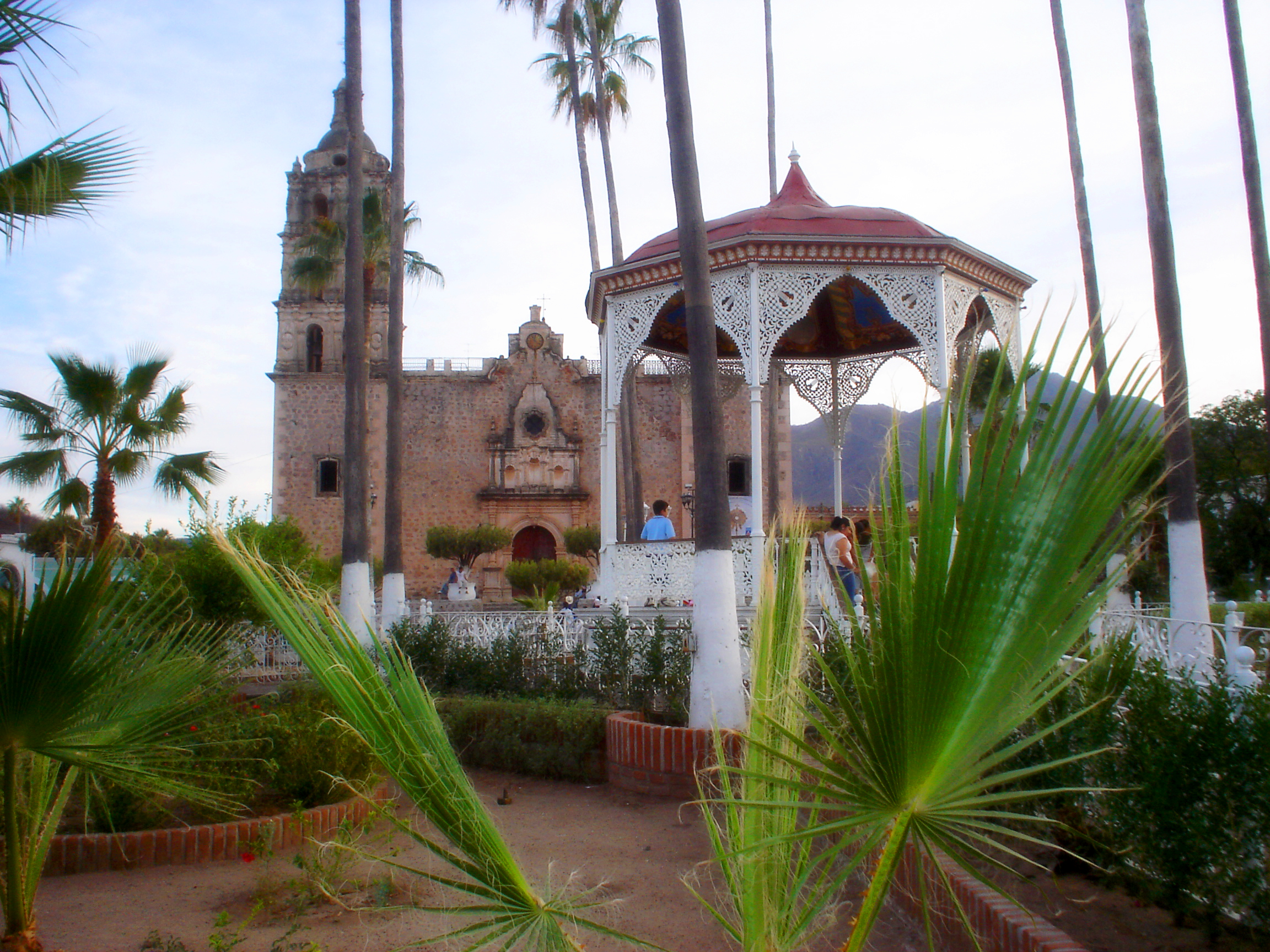 Plaza de Álamos, y Templo de Nuestra Señora de la Purísima Concepción — en Álamos, estado de Sonora, México.